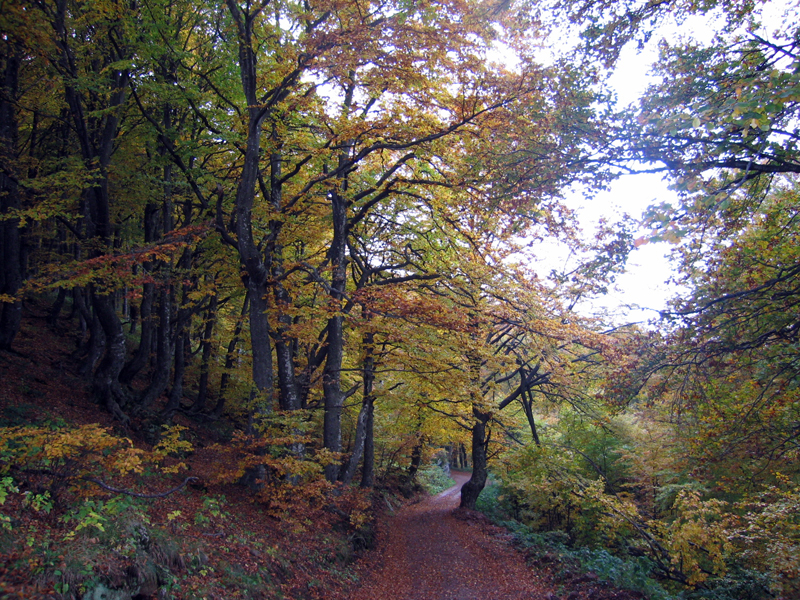 Babin zub na Staroj planini